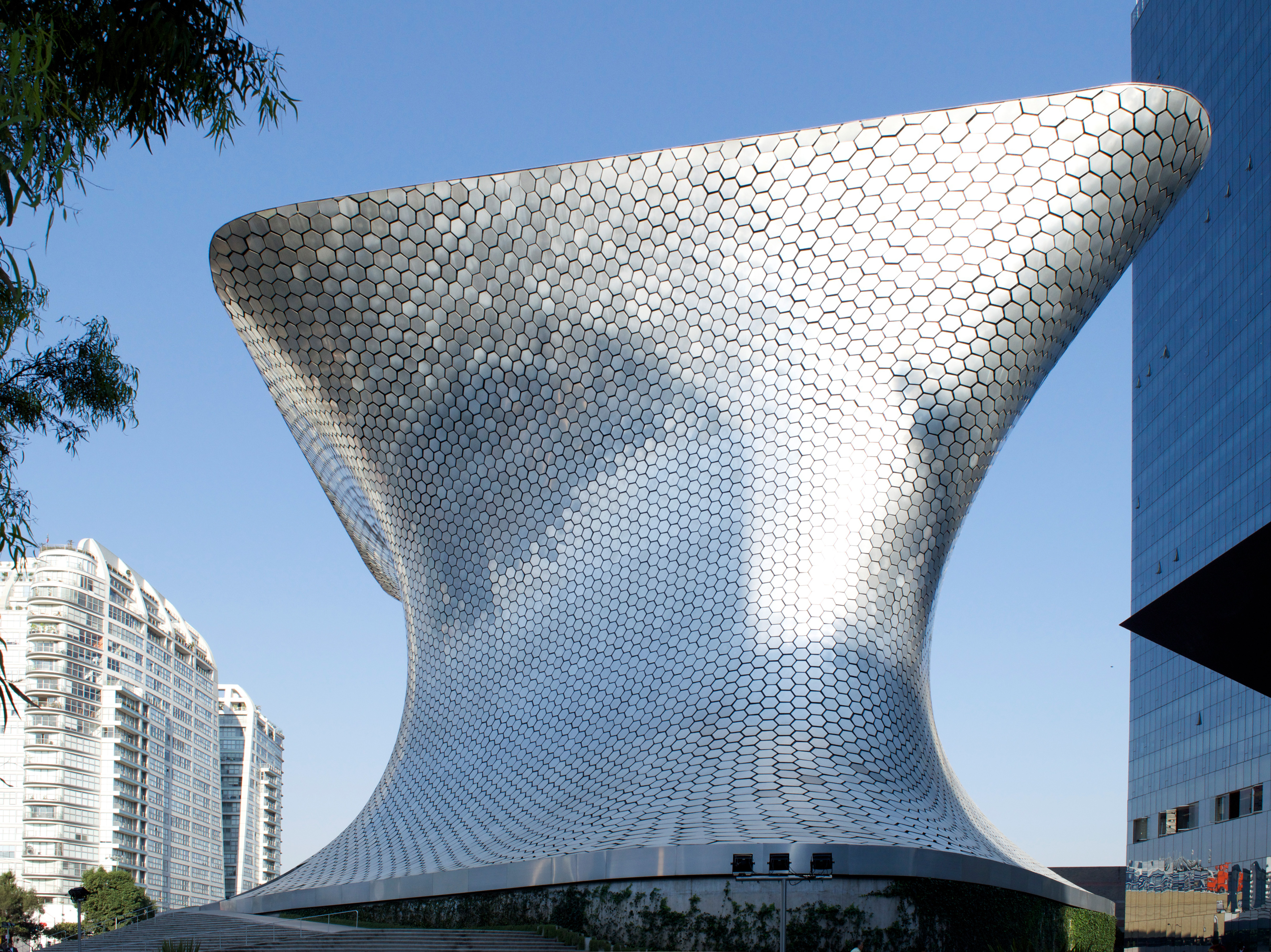 Museo Soumaya Plaza Carso — México, D. F.